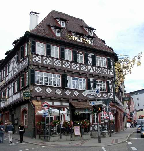 Hotel Post Nagold 2004- selbst fotografiert 13.9.2004